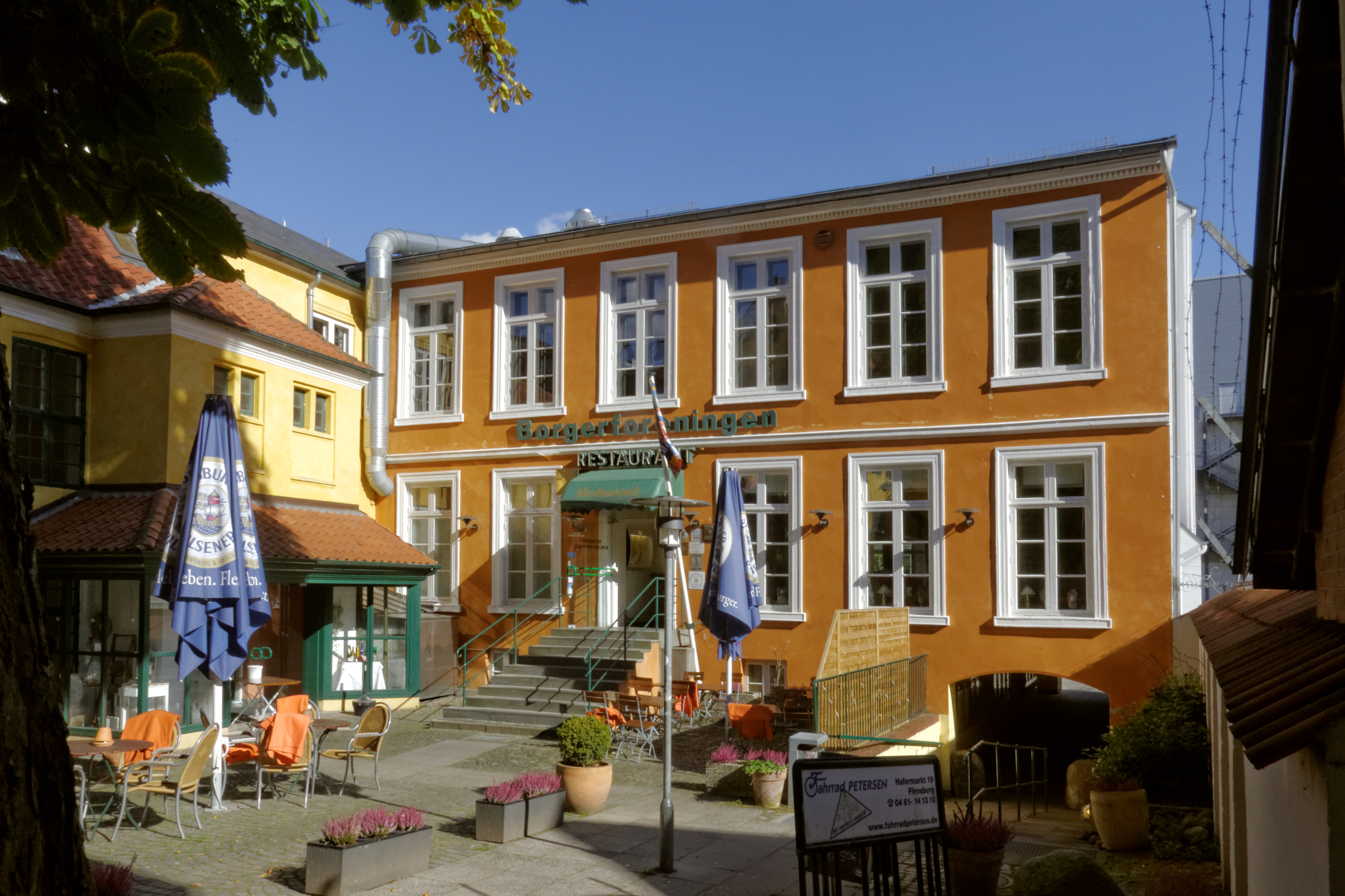 Flensburg, Holm 17; Kaufmannshof: Quergebäude; Restaurant Borgerforeningen